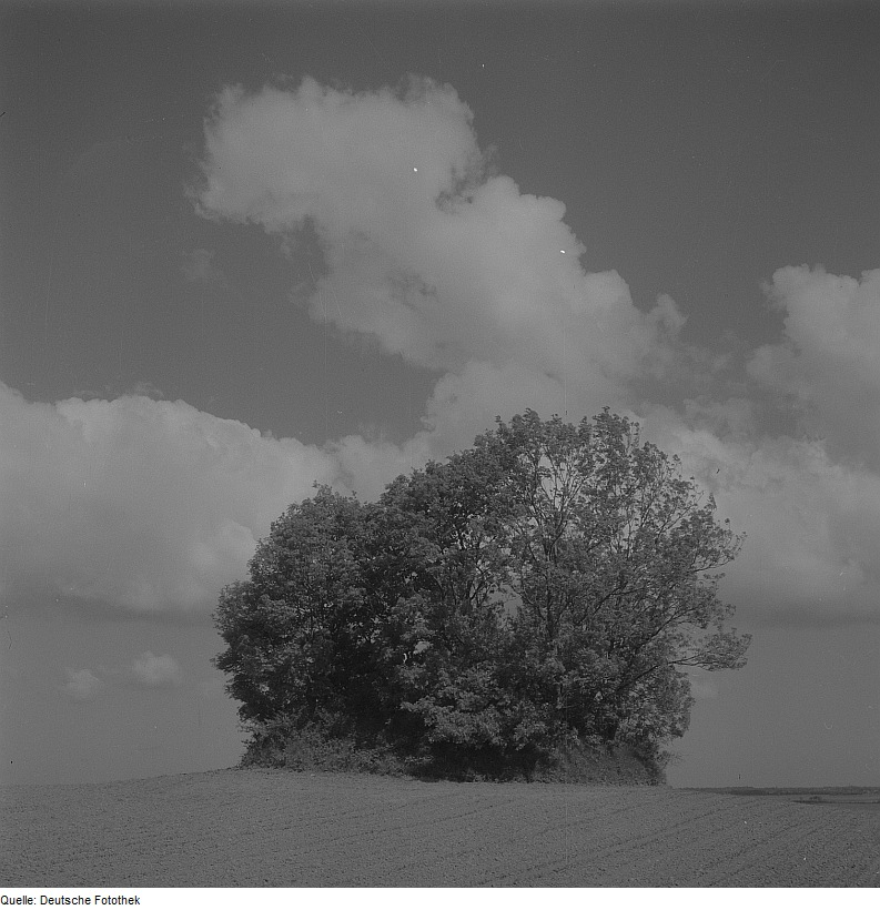 Original image description from the Deutsche Fotothek Hünengräber